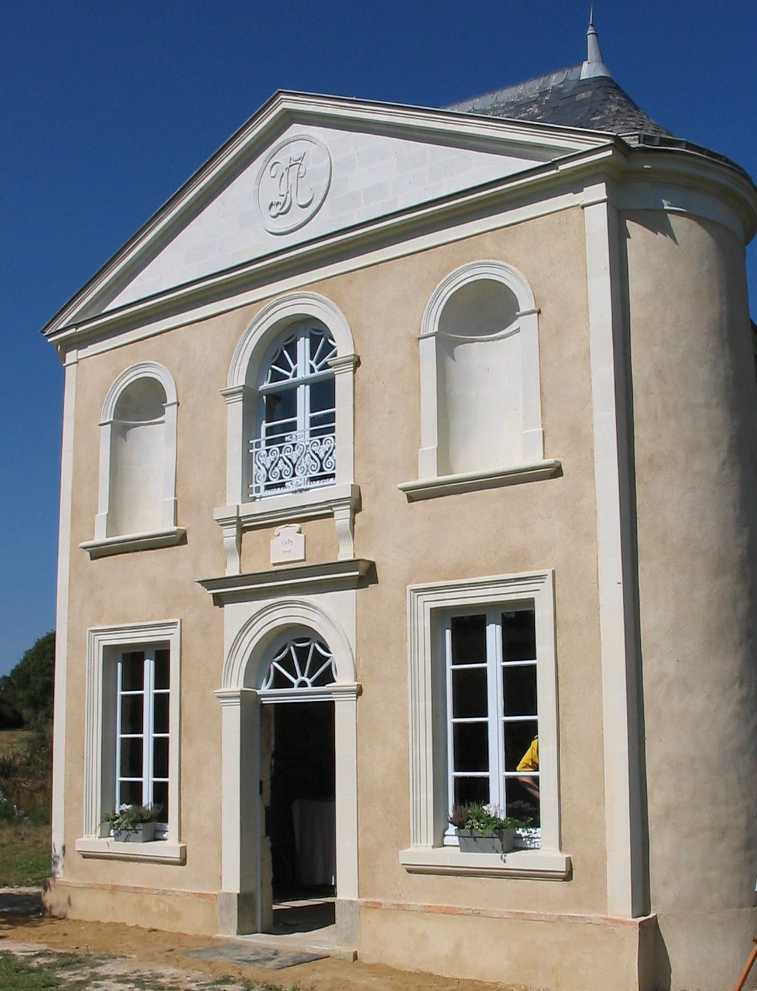 château de la Bouquetière 53290 Saint-Denis-d'Anjou